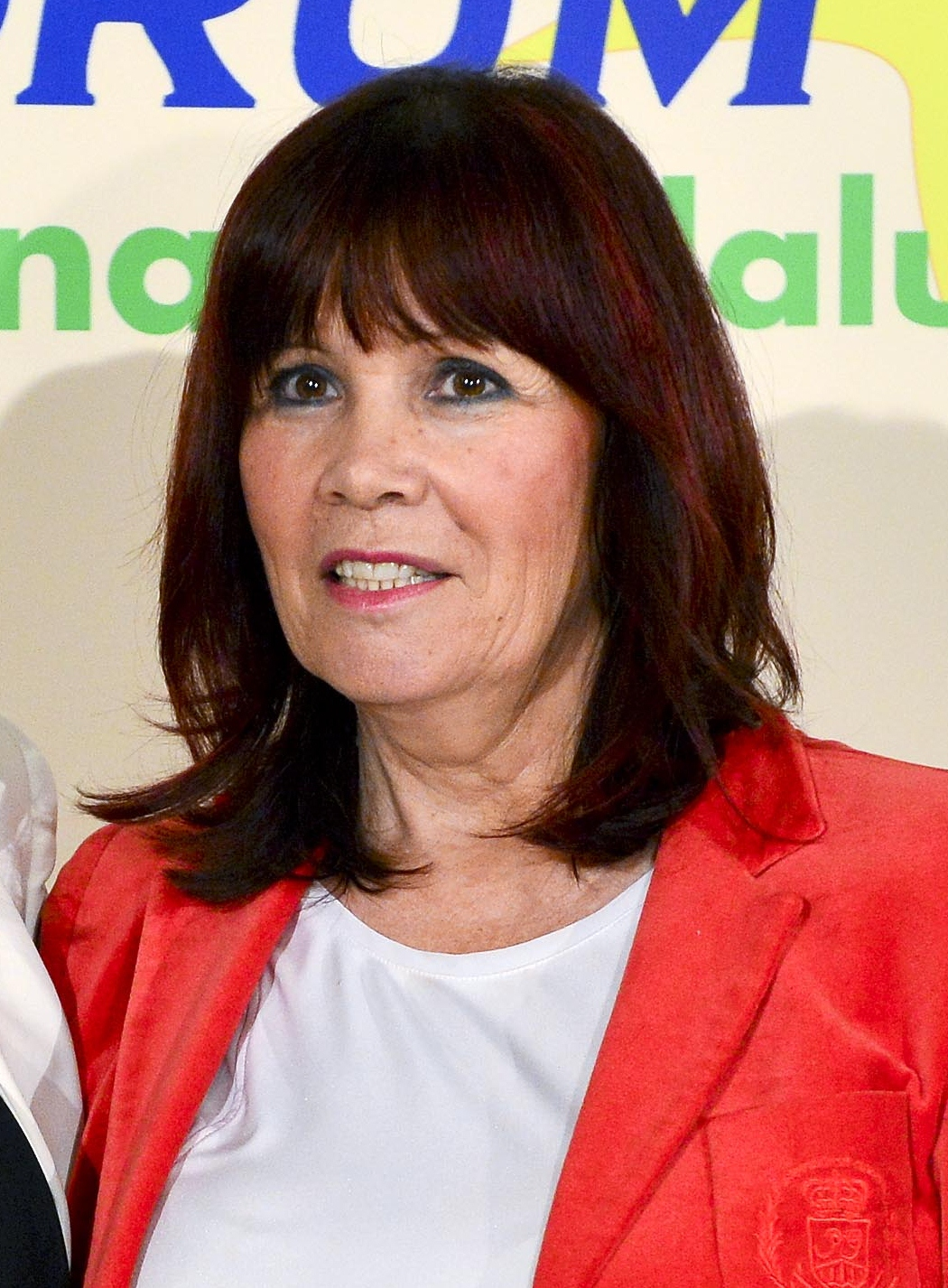 14.11.21 Conferencia de Micaela Navarro.Sevilla.1